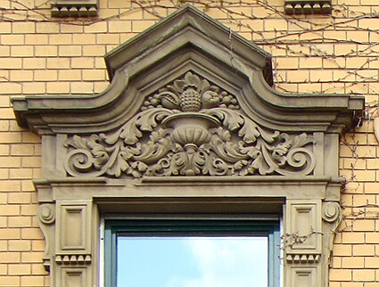 Ausschnitt aus unten angegebener Quelle